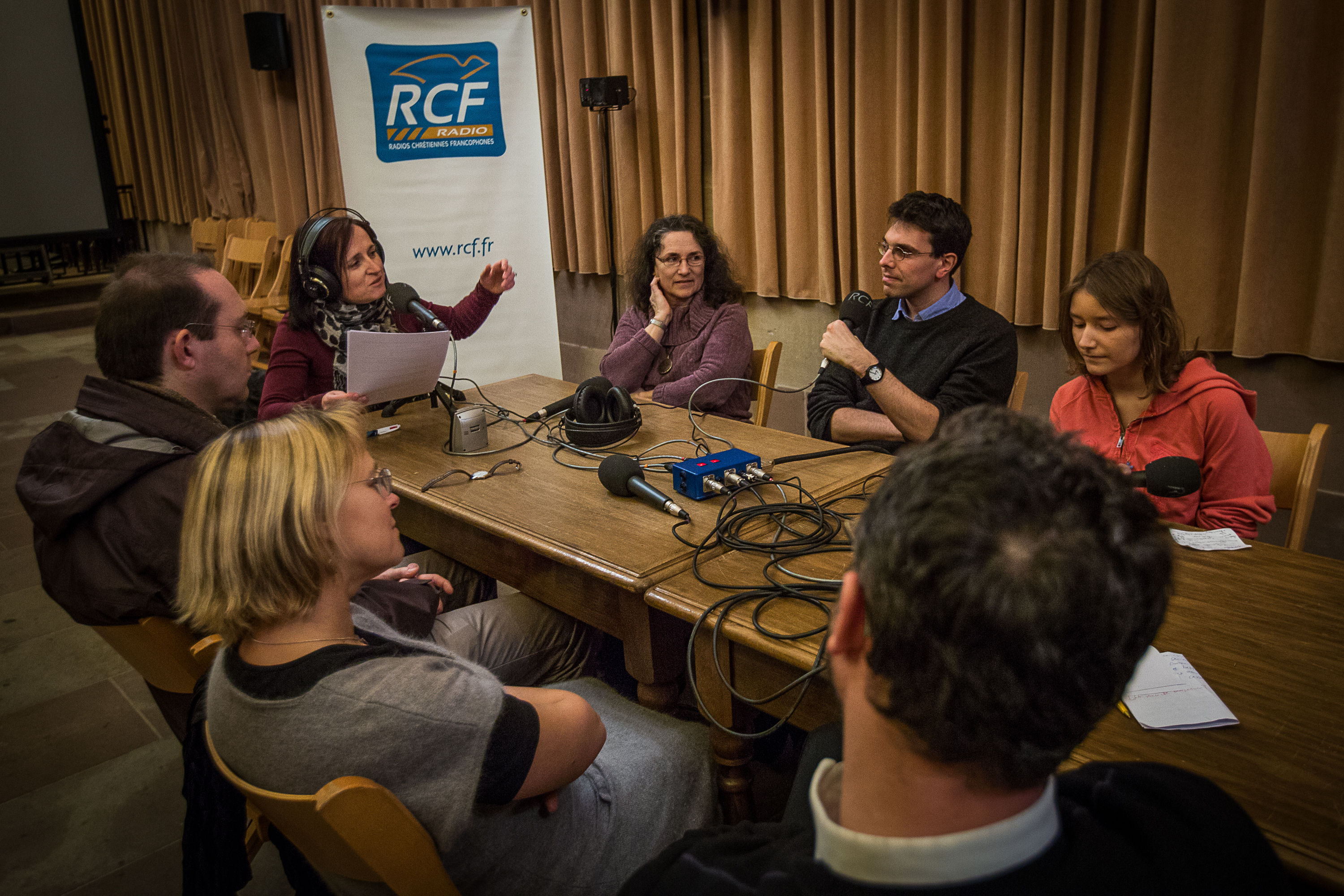 36e rencontres internationales de Taizé Strasbourg 27 décembre 2013